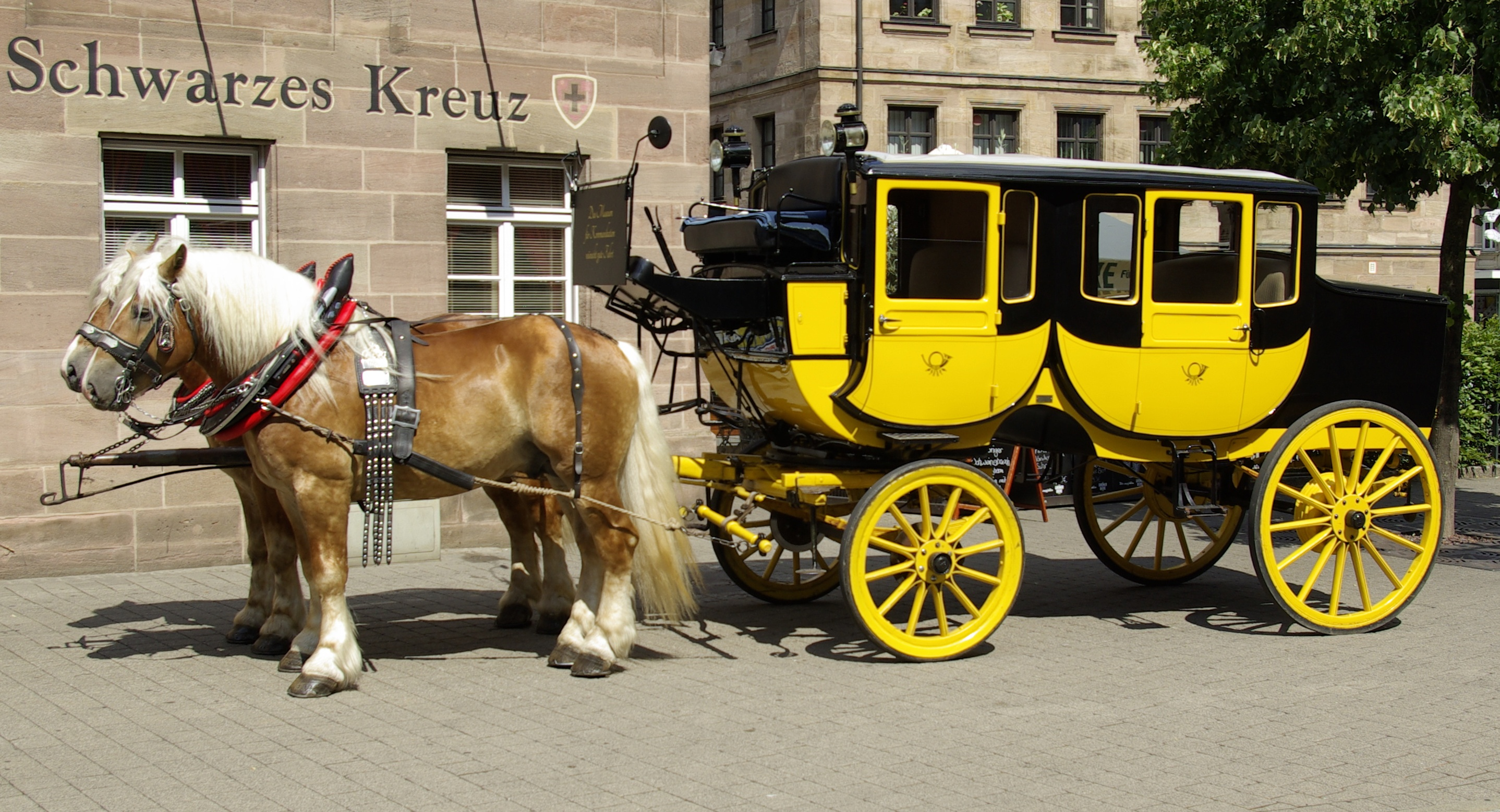 Postkutsche (Typ Berline mit Coupé, Nachbau von 1939), gezogen von zwei Rheinisch-Deutsches Kaltblütern, in Fürth.